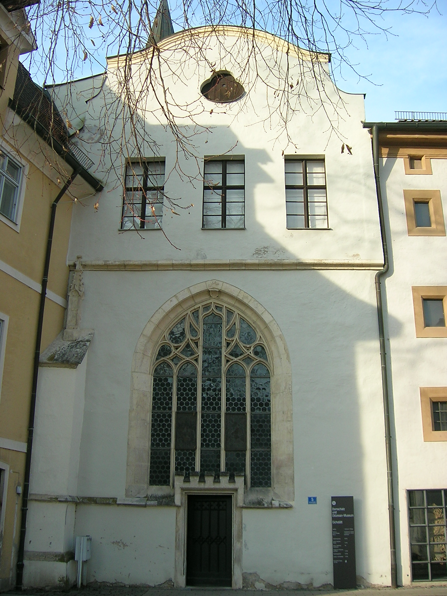 Residenzplatz 5 Eichstätt: Eingang Mortuarium und Diözesanmuseum.